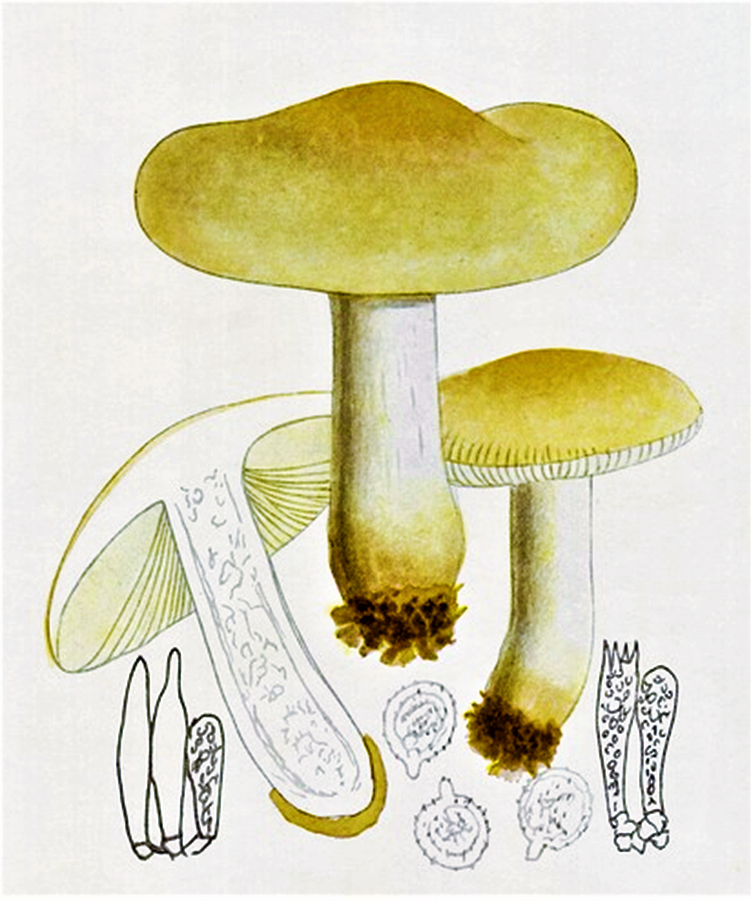 Giacomo Bresadola: Russula ochroleuca (Pers., 1801) Fr. (1838)